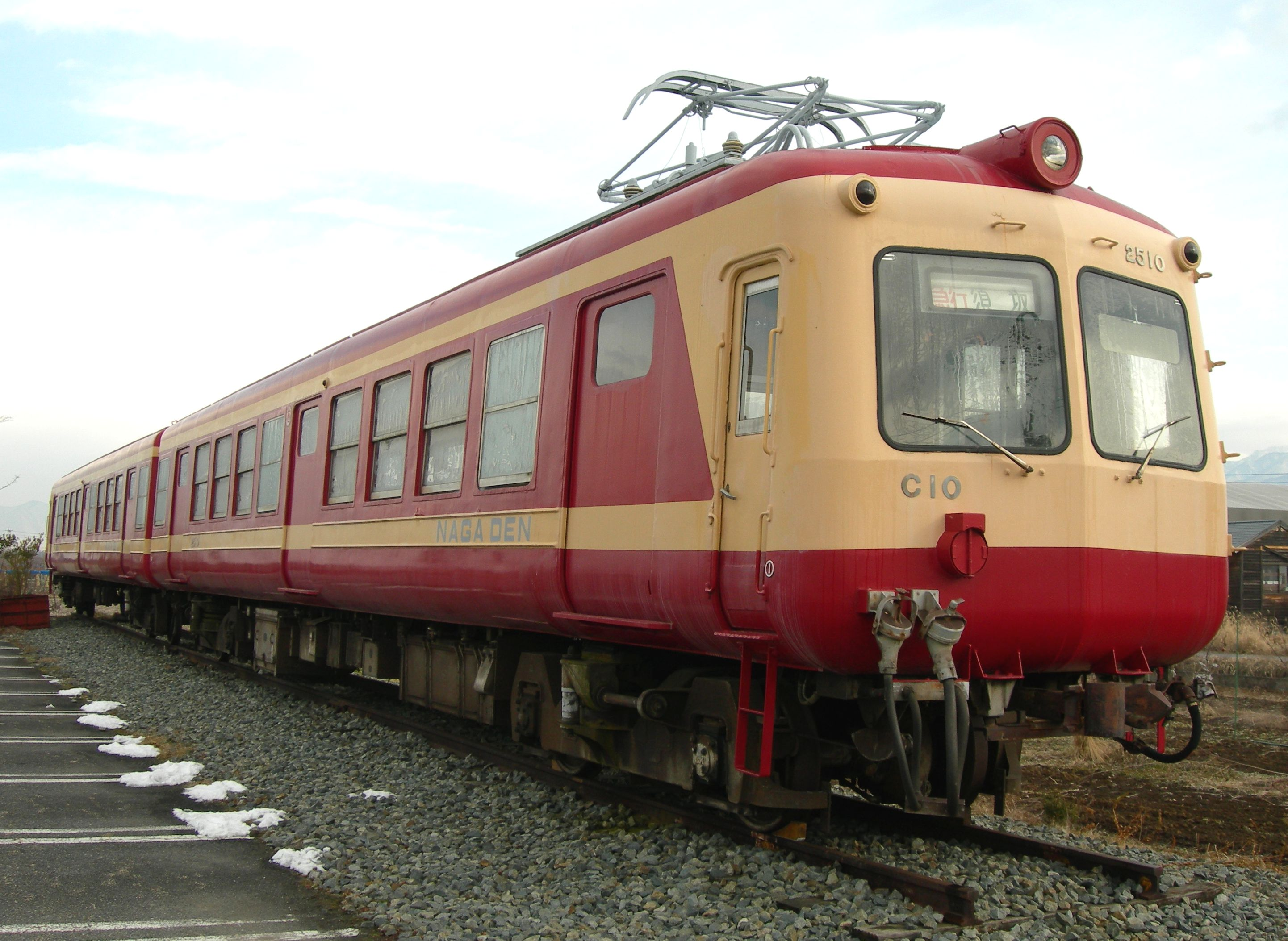 長野電鉄2500系電車